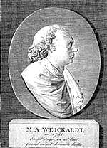 Porträt des Artzes Melchior Adam Weikard